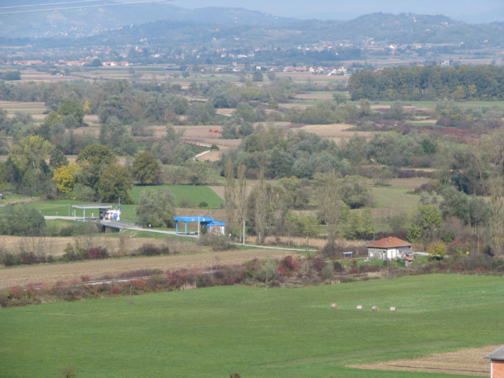 Granični prijelaz sa SLO i željeznička stanica u Kraju Donjem, Općina Marija Gorica, Zagrebačka županija, Hrvatska